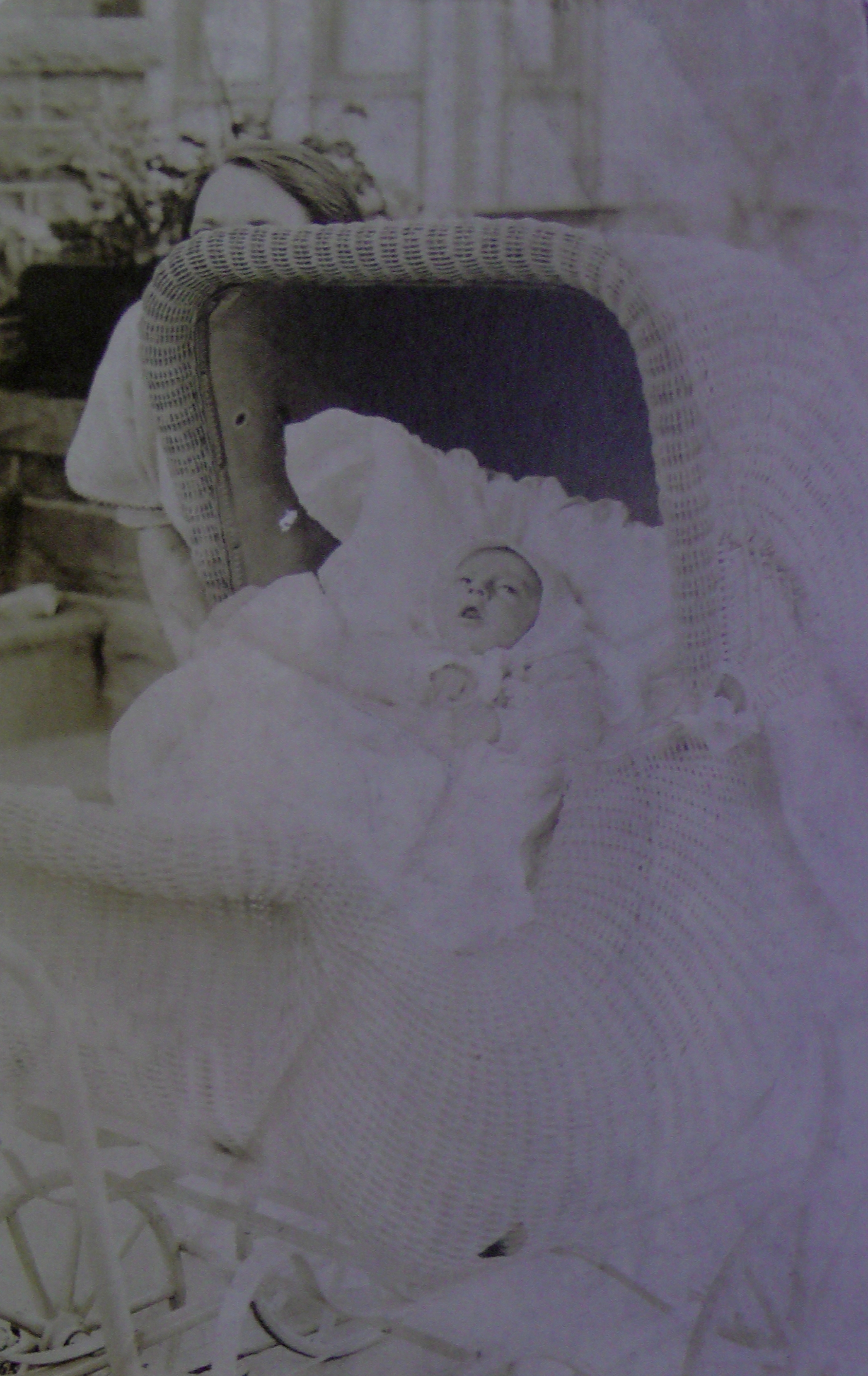 Коллекция Linda Fregni Nagler, № 0375, 12,5 х 8 см